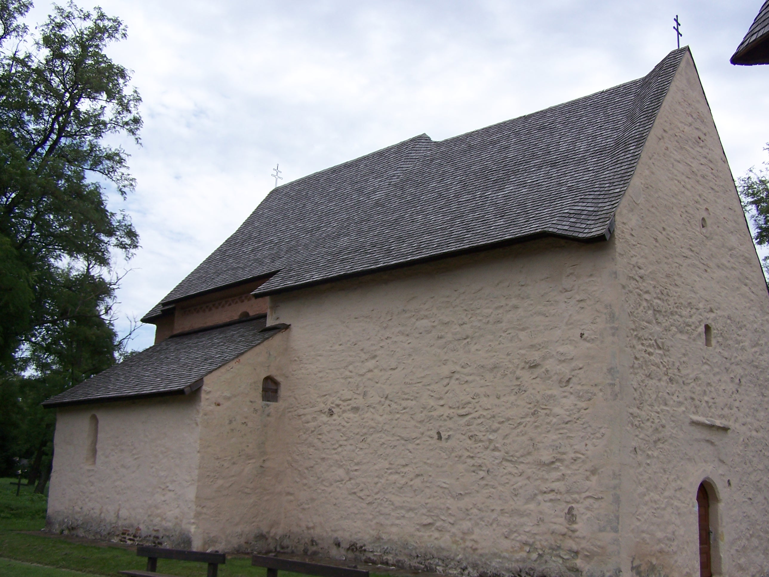 Római katolikus templom (Szent Imre) (Egyházasdengeleg, Temető)